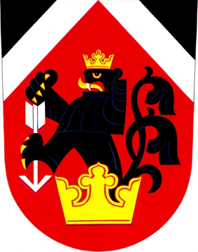 Znak, Postřelmov, okres Šumperk